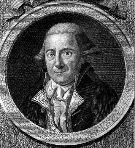 Portrait Christoph Girtanner